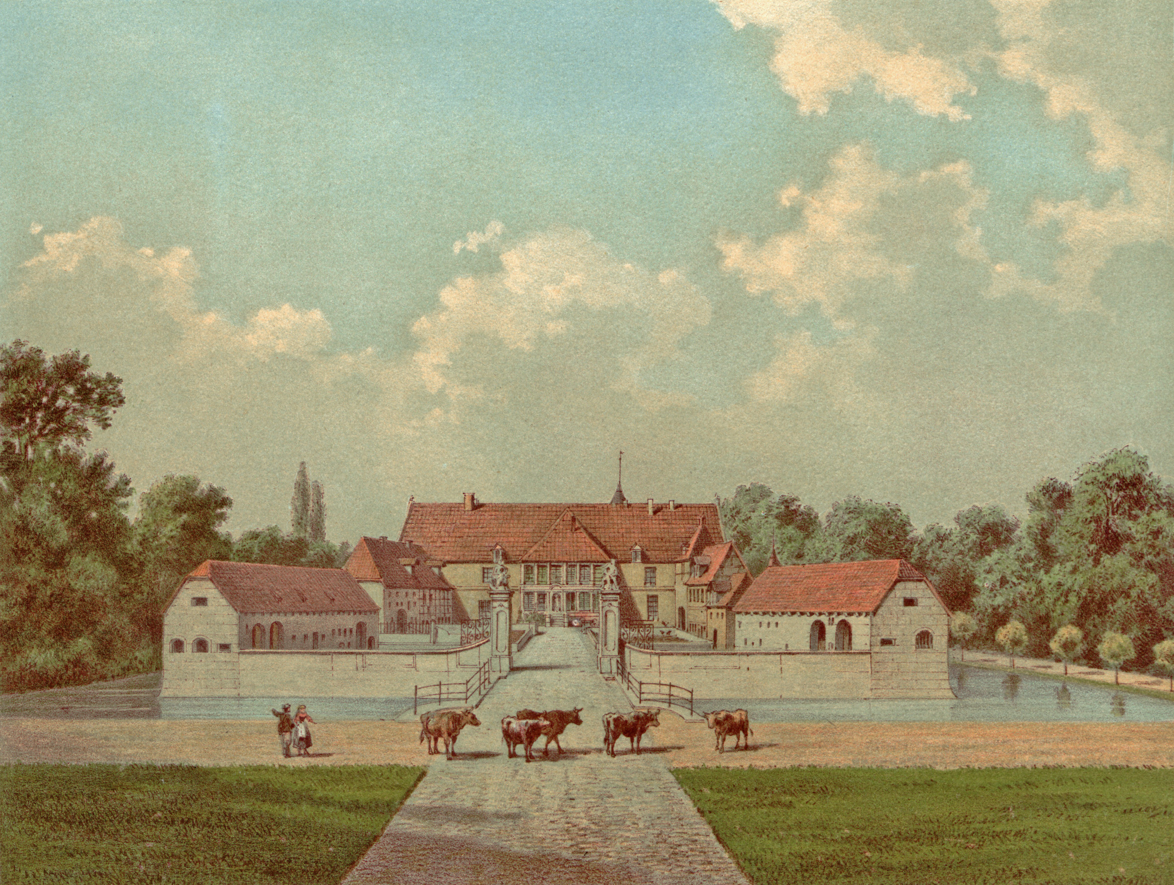 Farblithografie des Hauses Havixbeck im Münsterland, Kreis Münster